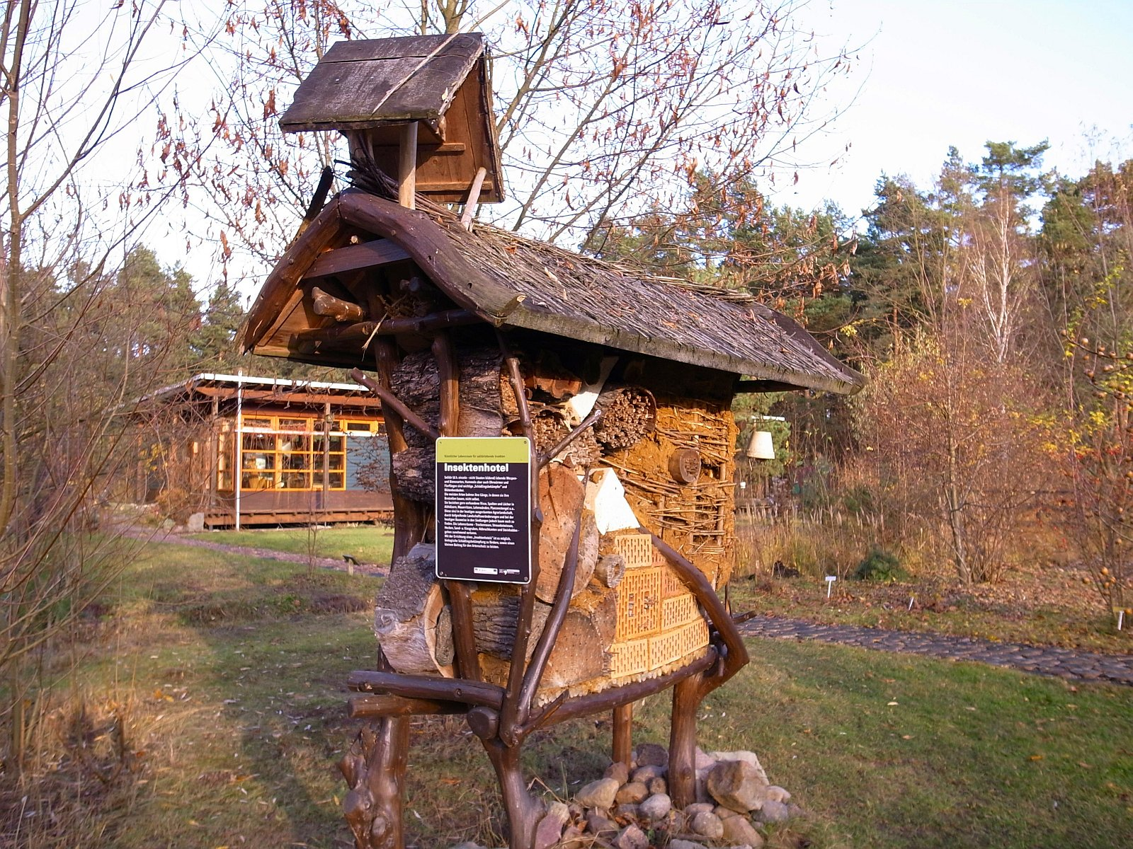 Biosphärenreservat Mittelelbe, Insektenhotel